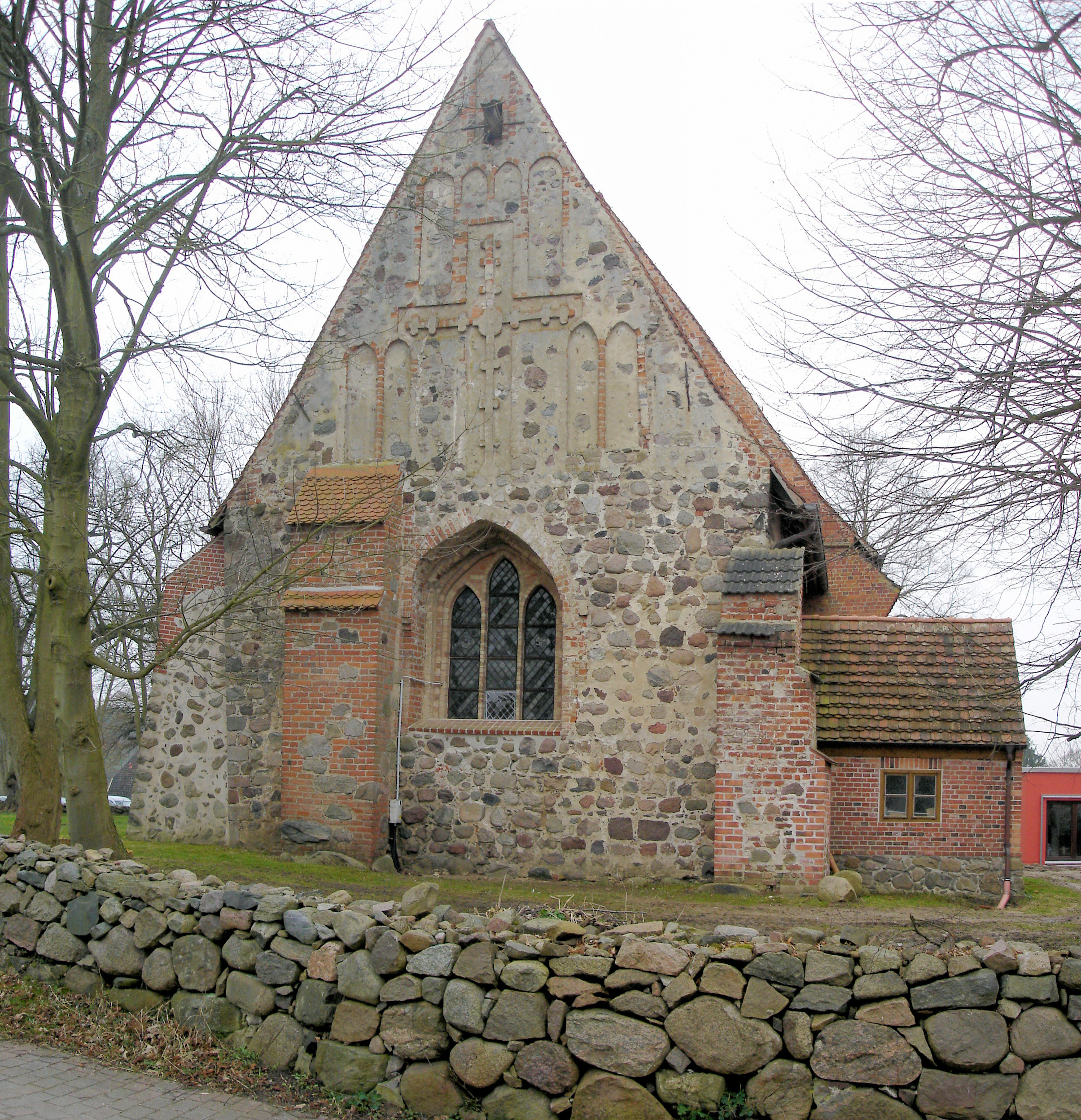 Kirche in Vilz bei Tessin (Mecklenburg) / Church in Vilz near Tessin (Mecklenburg-Western Pomerania)